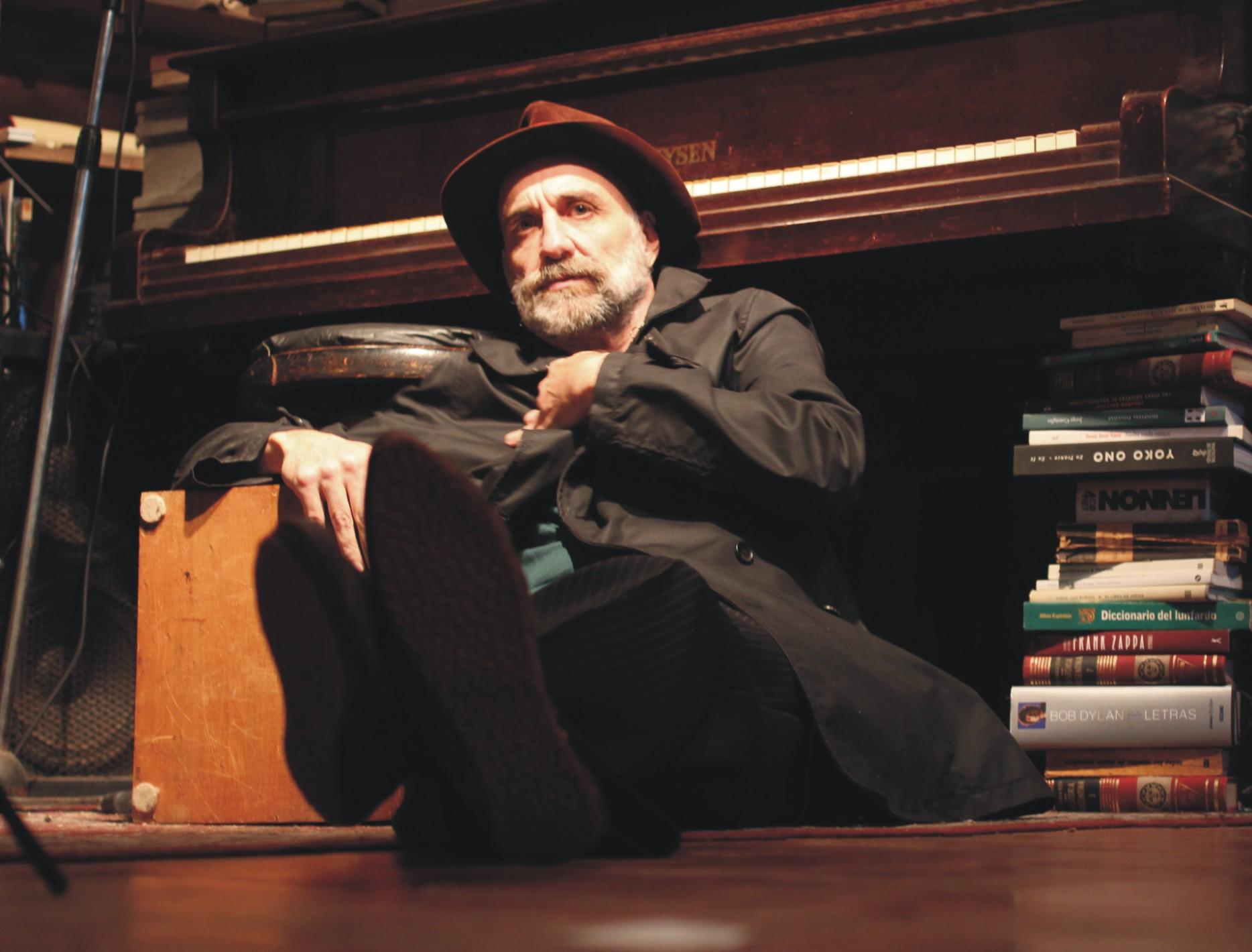 Cantautor Argentino de Tango Rock